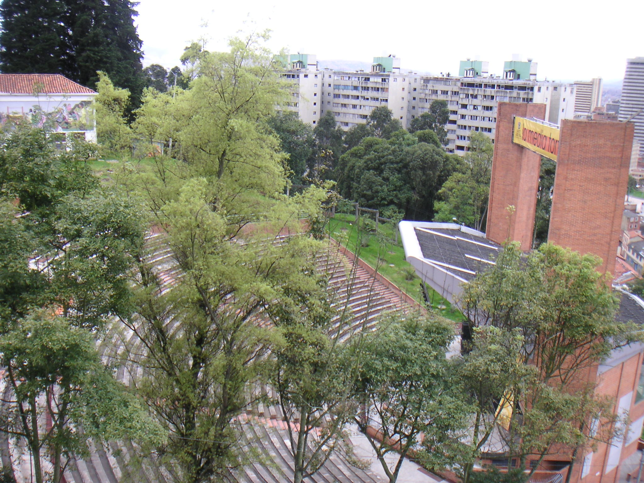 Description: Centro Cultural "La Media Torta", Bogotá, Colombia Source: Louise Wolff (darina), May 2005